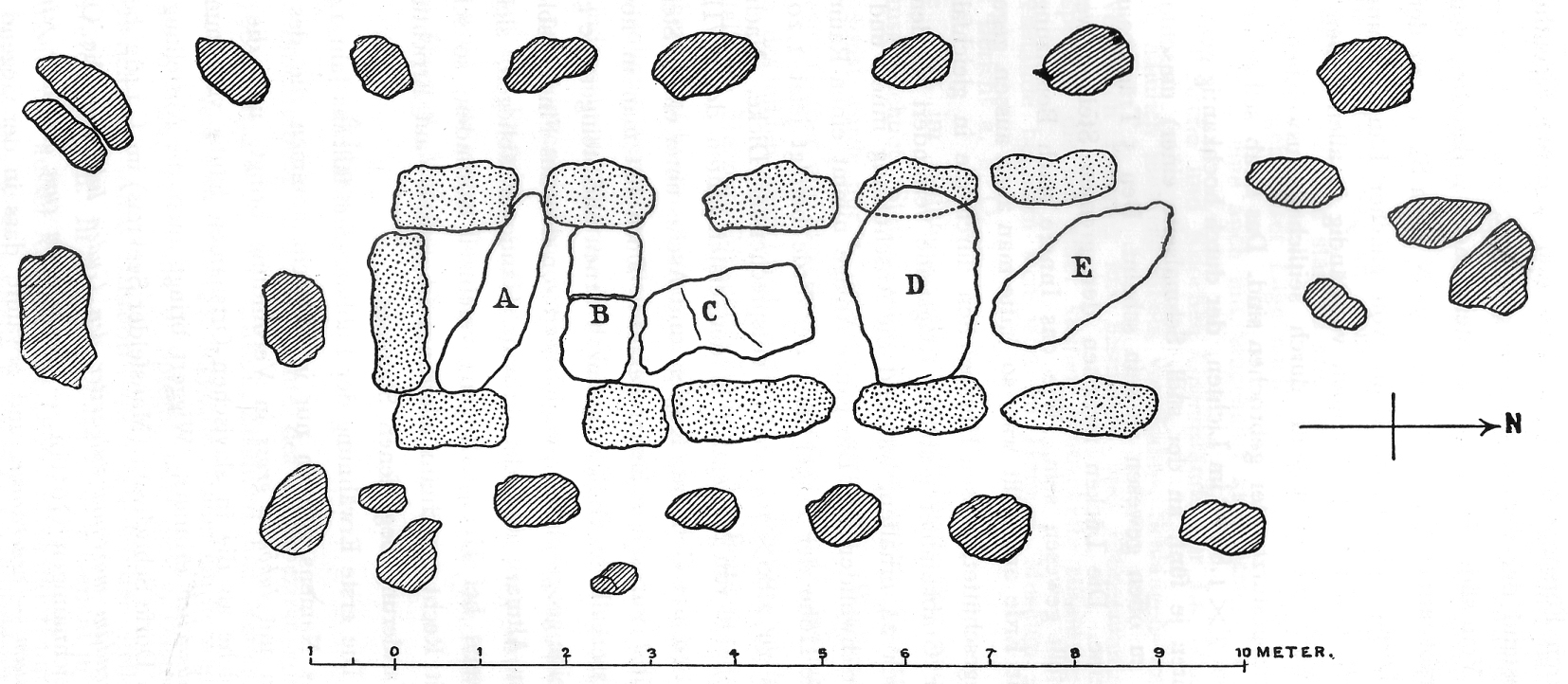 Lübbensteine